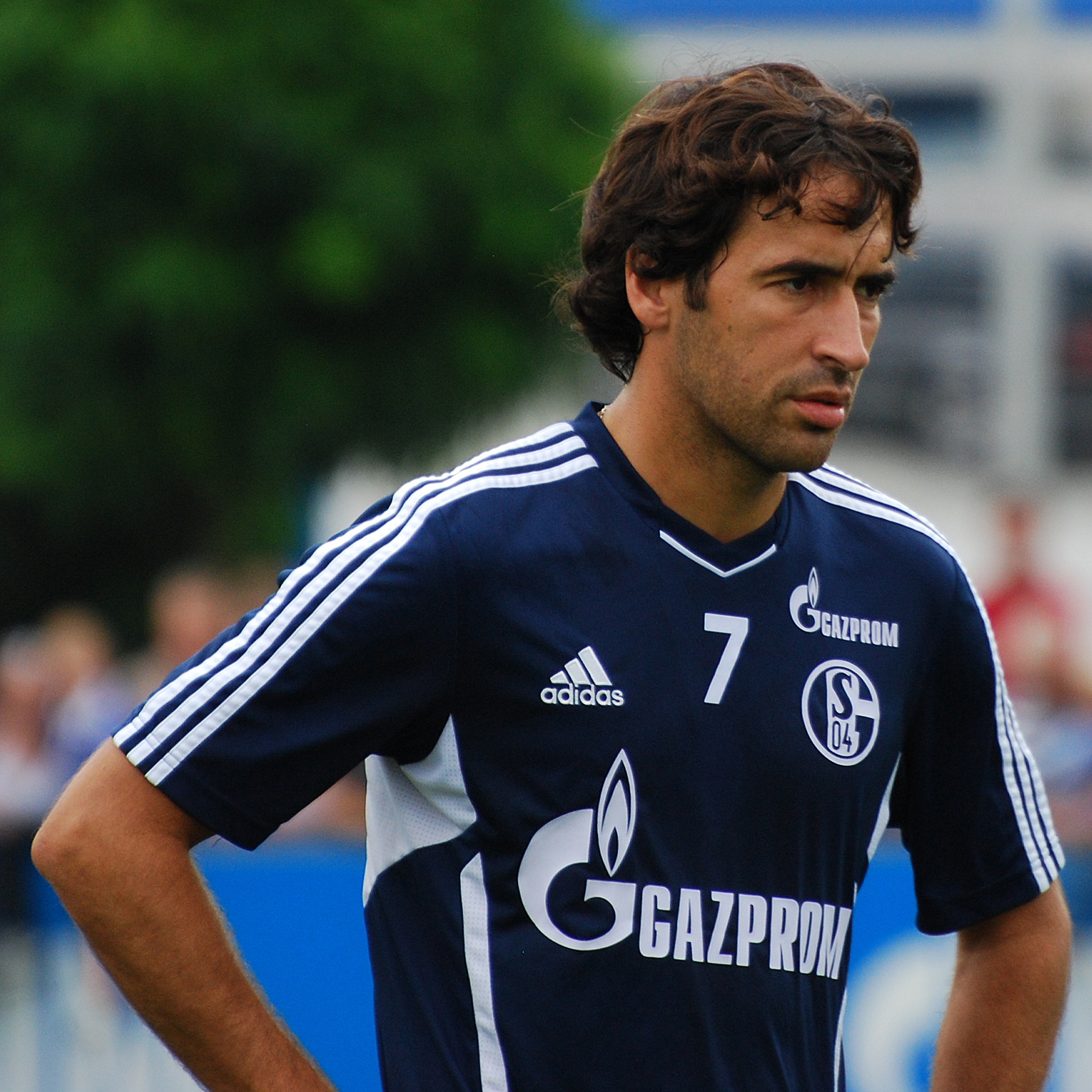 Raul Gonzalez Blanco